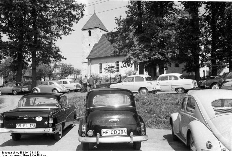 "Haben sie schon für ihre heile Rückkehr gedankt?" Evangelische Autobahnkirche Exter